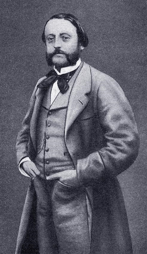 Amédée de Jallais, photographie issue de Pierre Larousse, Grand Dictionnaire universel du XIXe siècle, 1er supplément, 1878.